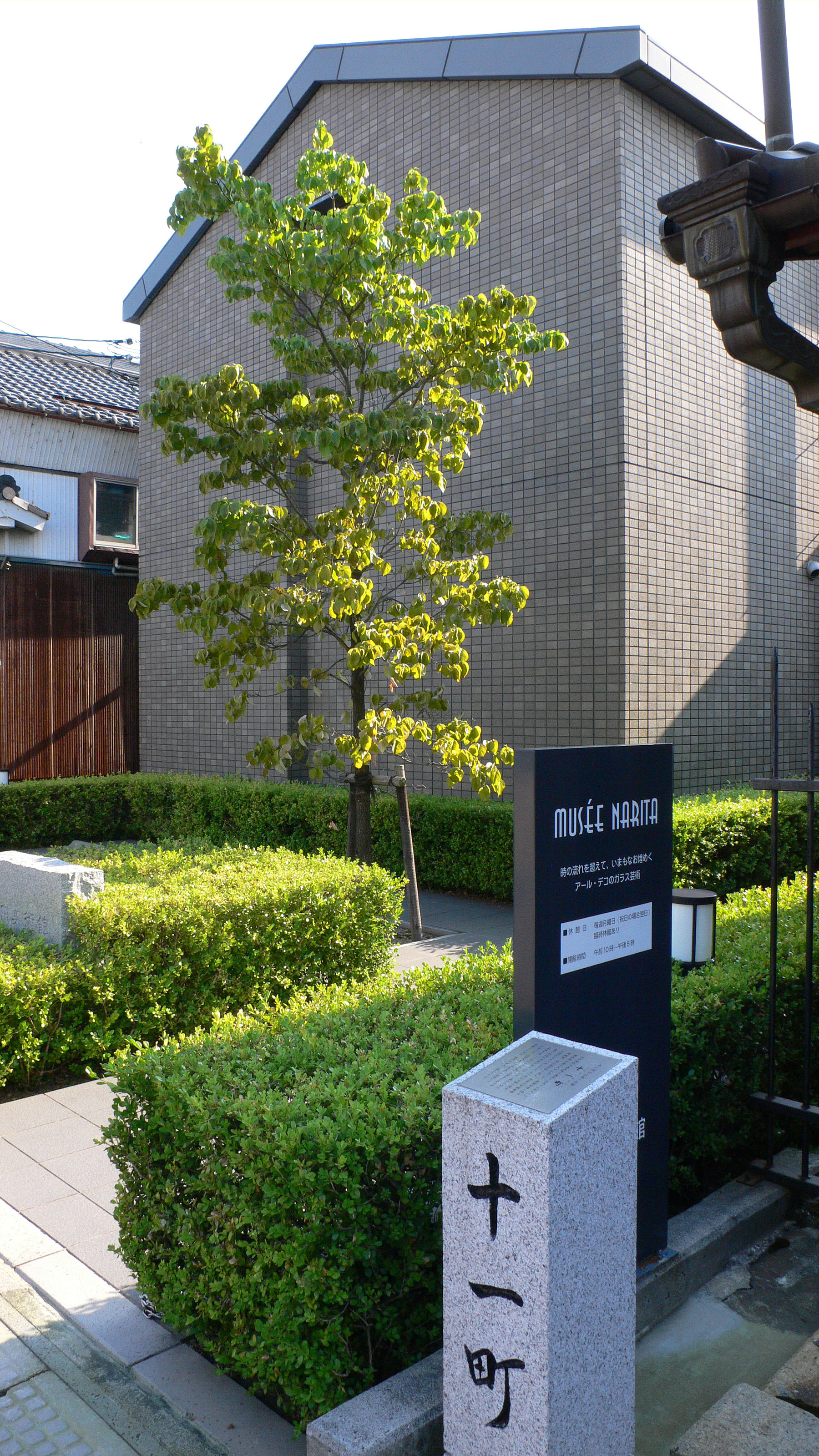 Narita Museum in Nagahama, Shiga